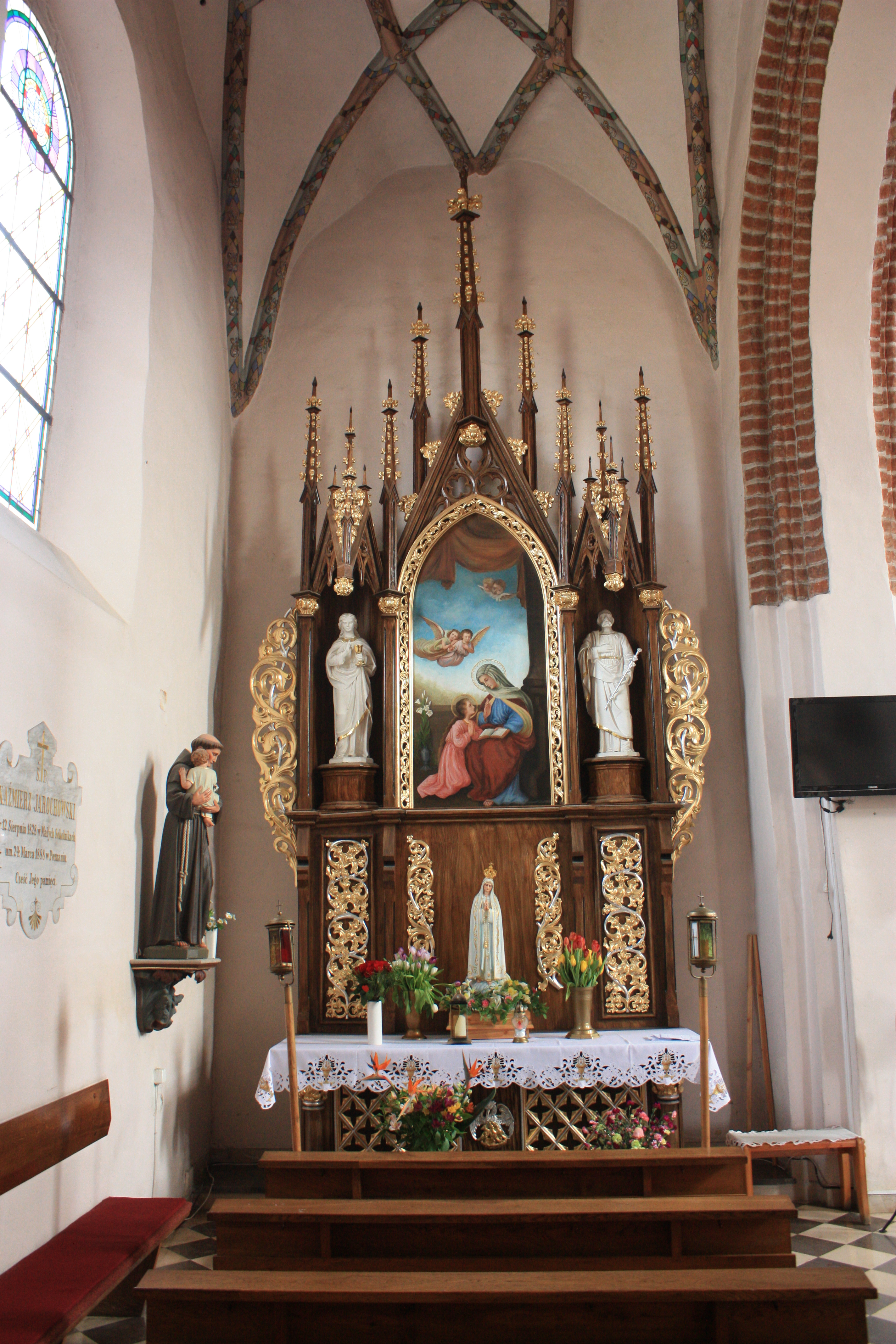 Kościół Narodzenia NMP w Kaźmierzu. Ołtarz boczny w północnej nawie.